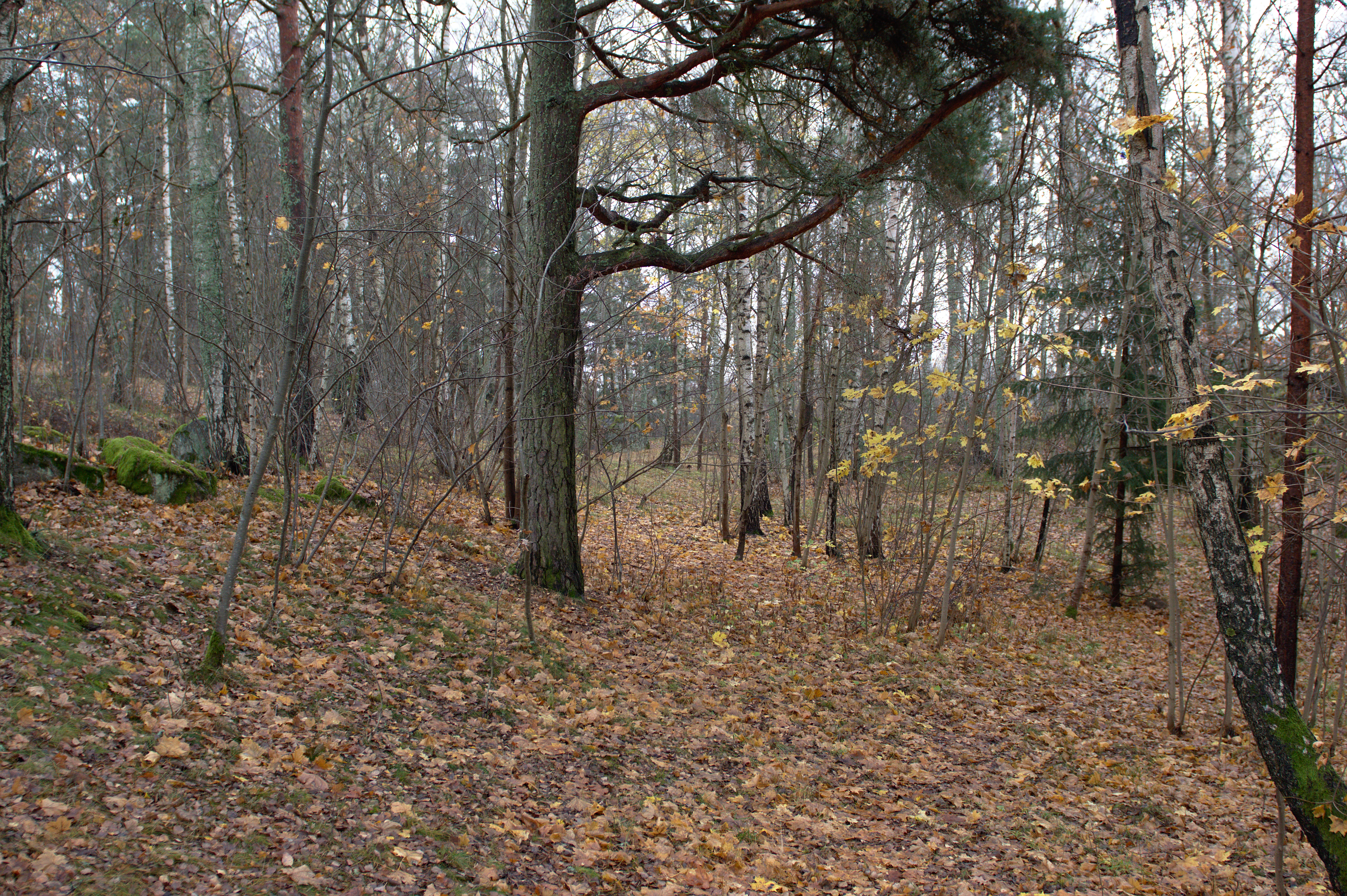 Gökstenens naturreservat i Eskilstuna.